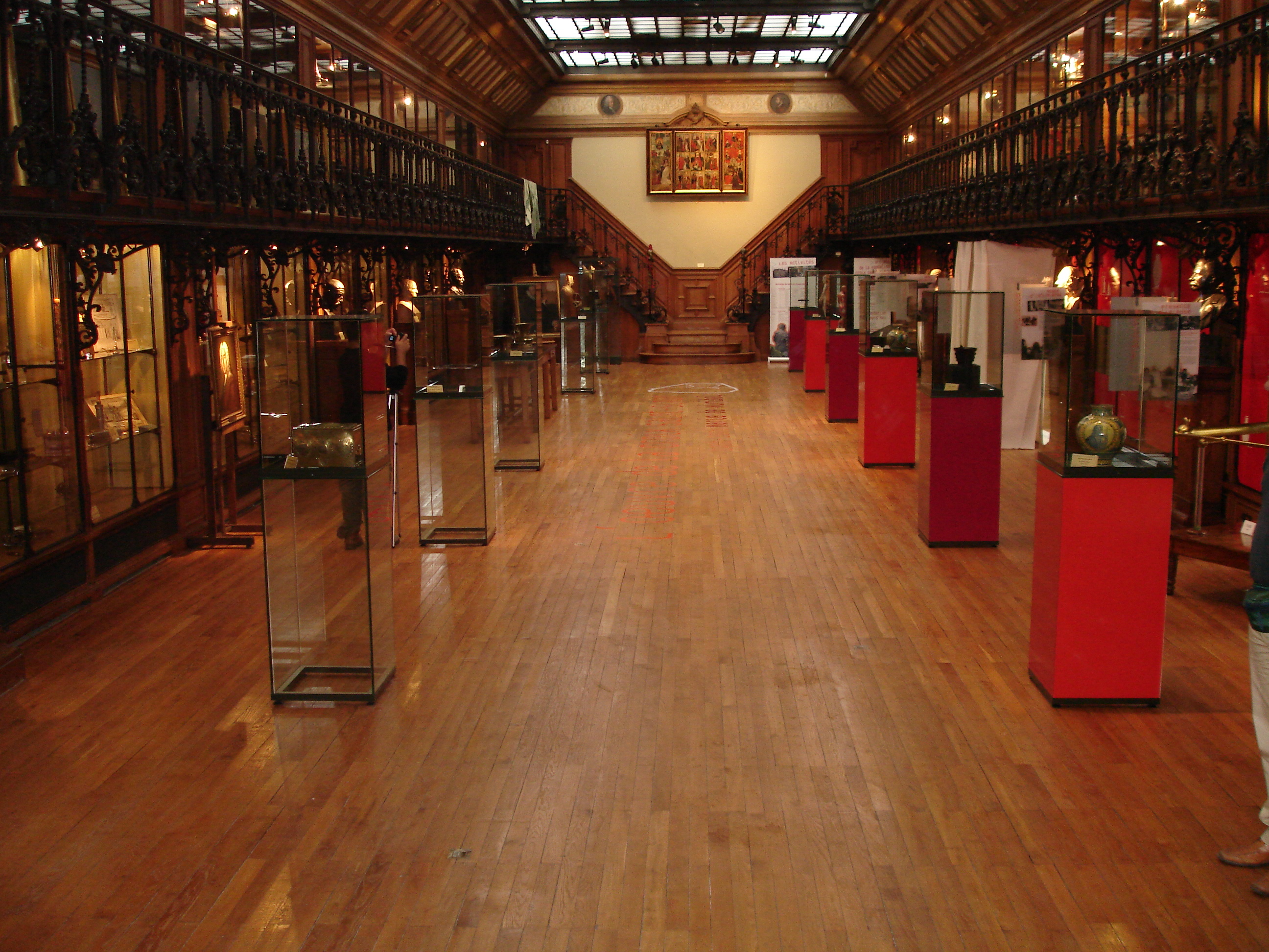 Musee d'Histoire de la Medecine, Paris, France